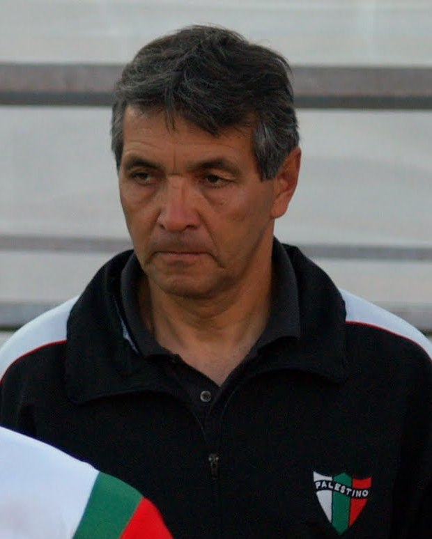 Gustavo Benitez